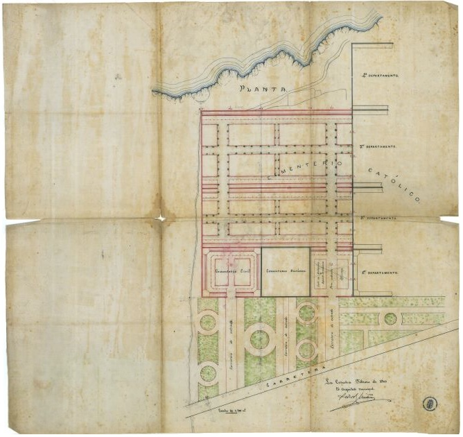 Cementerio Municipal. La Coruña Febrero de 1900. El Arquitecto municipal